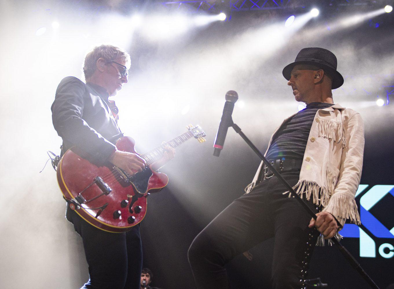 La música de los 80 llenó la Plaza Mayor en la tarde noche del lunes 13 de mayo, mientras en la Pradera Belako ofrece su sonido post-punk a los más modernos.